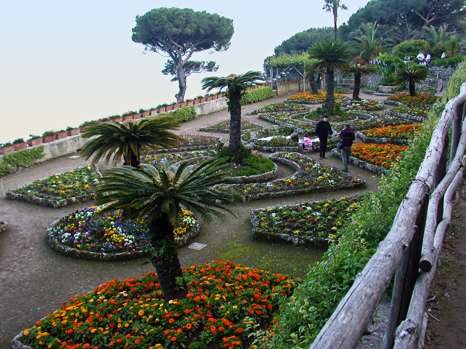 The Belvedere — Villa Rufolo, Ravello.